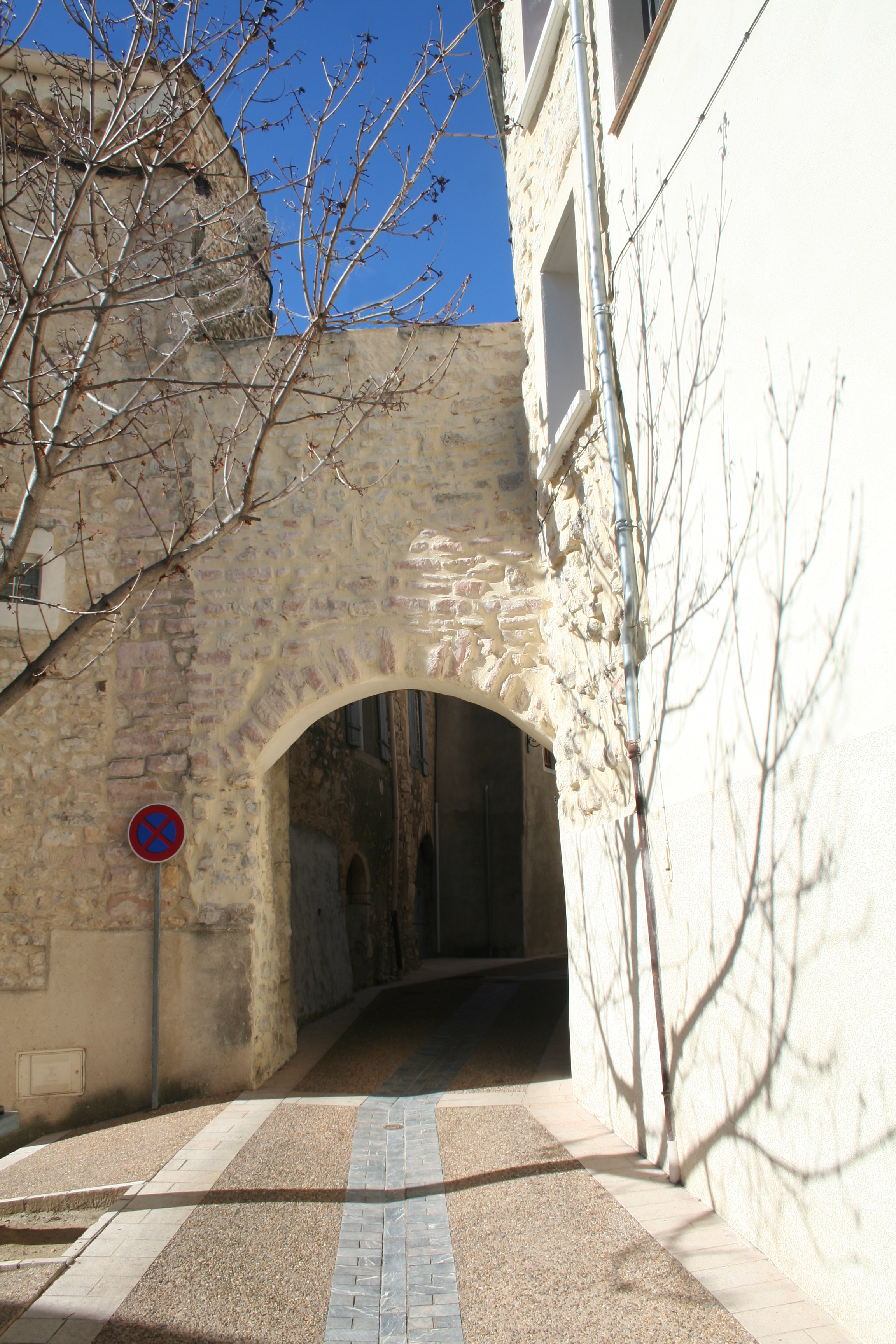 Causses-et-Veyran (Hérault) - porte de la Pompe Neuve, vue de l'extérieur.